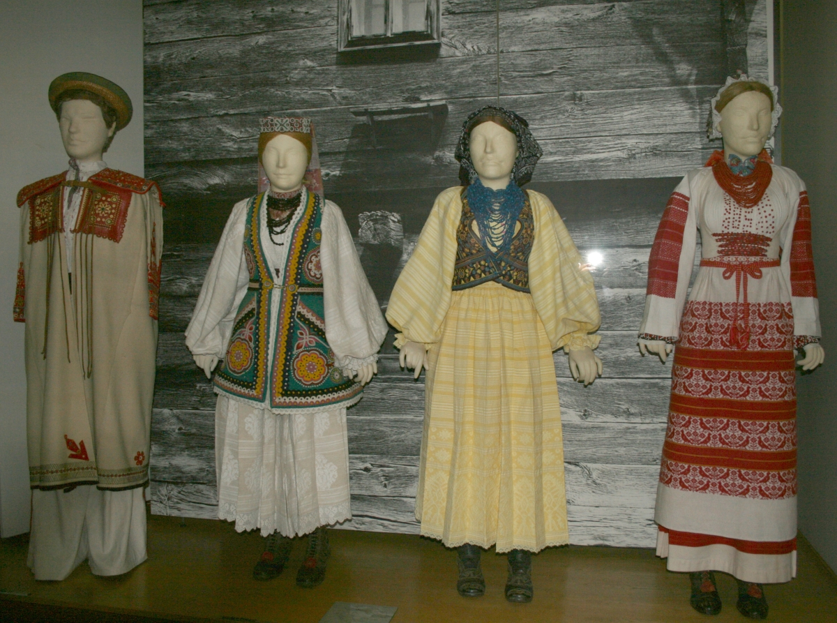 snimljeno tijekom Noći muzeja u Etnografskom muzeju u Zagrebu